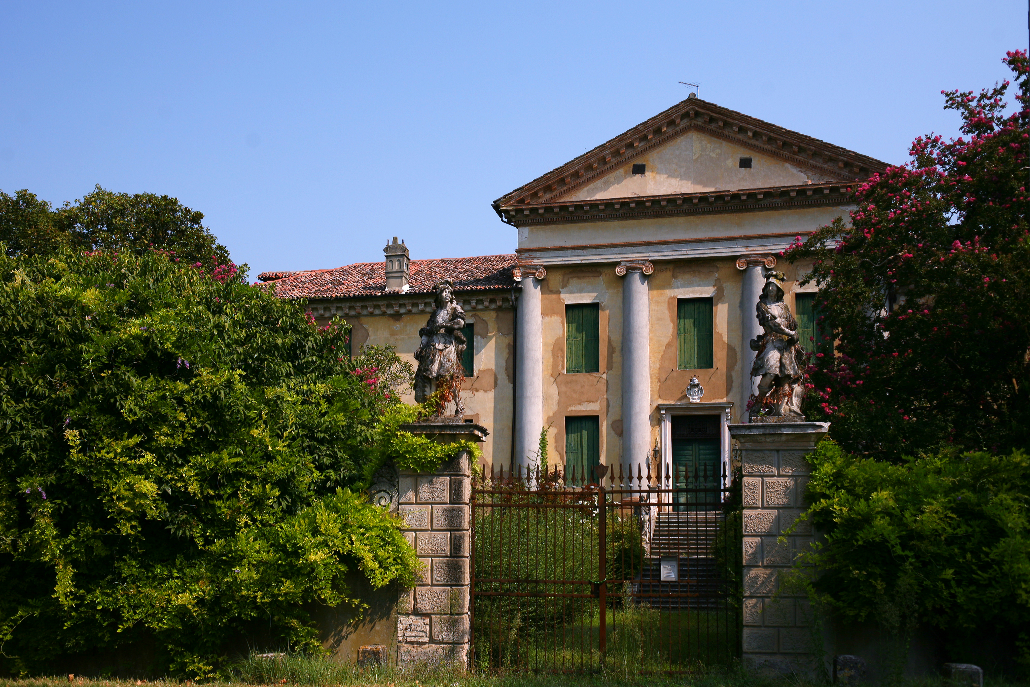 Villa Rigoni Savioli ad Abano Terme, veduta di tre quarti